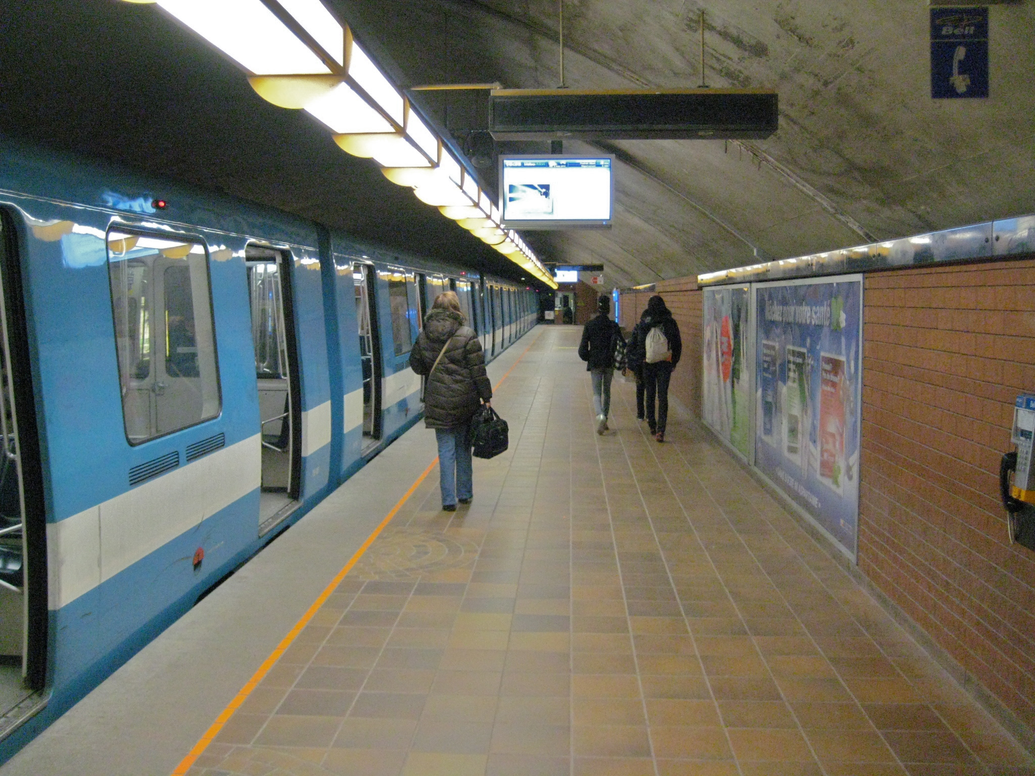 Quai de la station Côte-Vertu du métro de Montréal